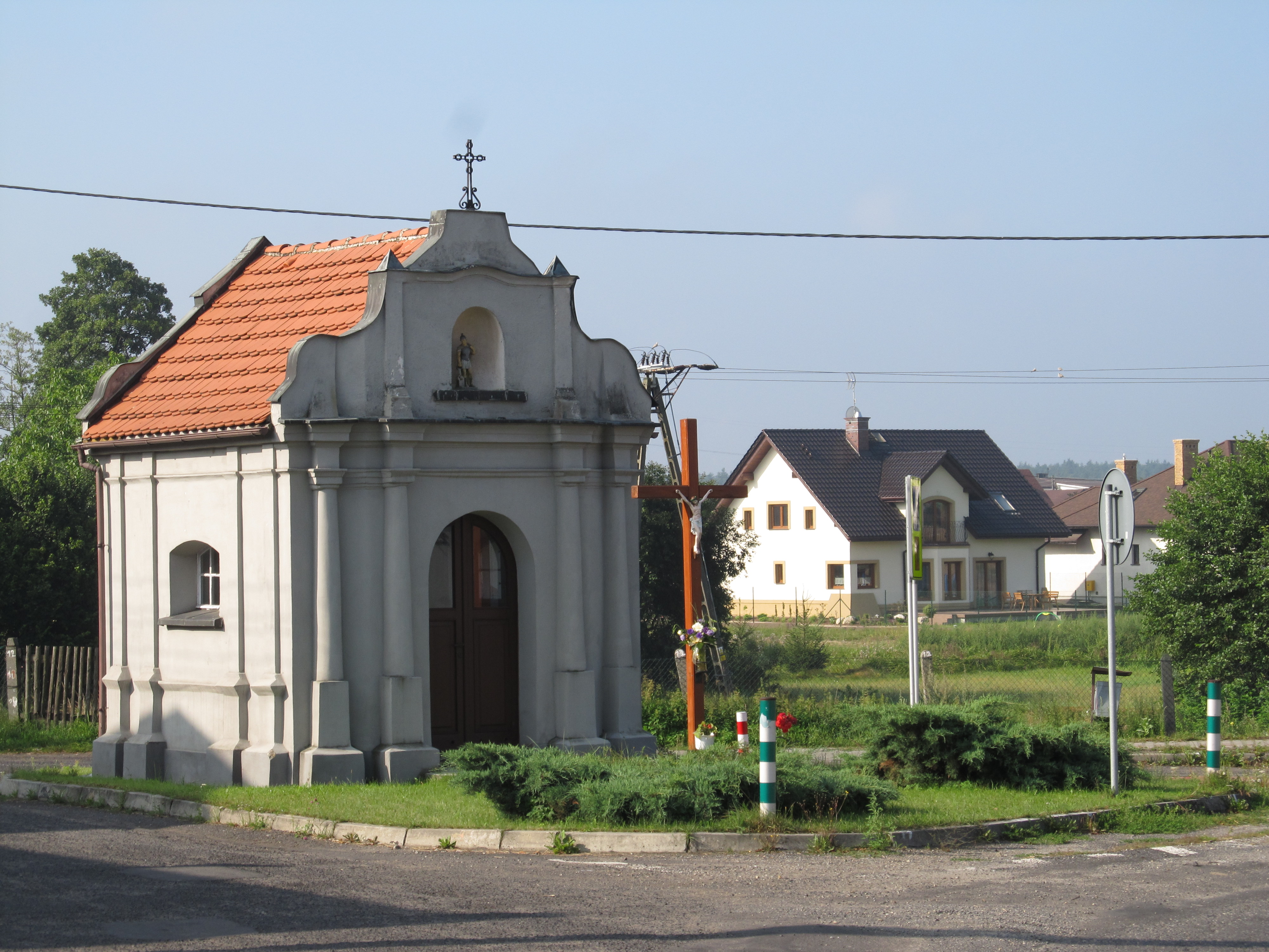 Stanica, zbieg ulic Gliwickiej i 1 Maja - kaplica przydrożna, XVIII w.